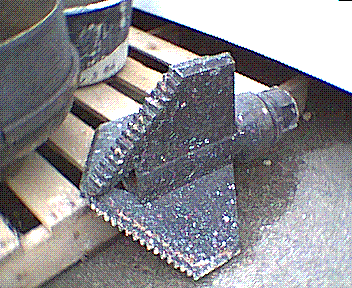 Outil de forage de type trilame